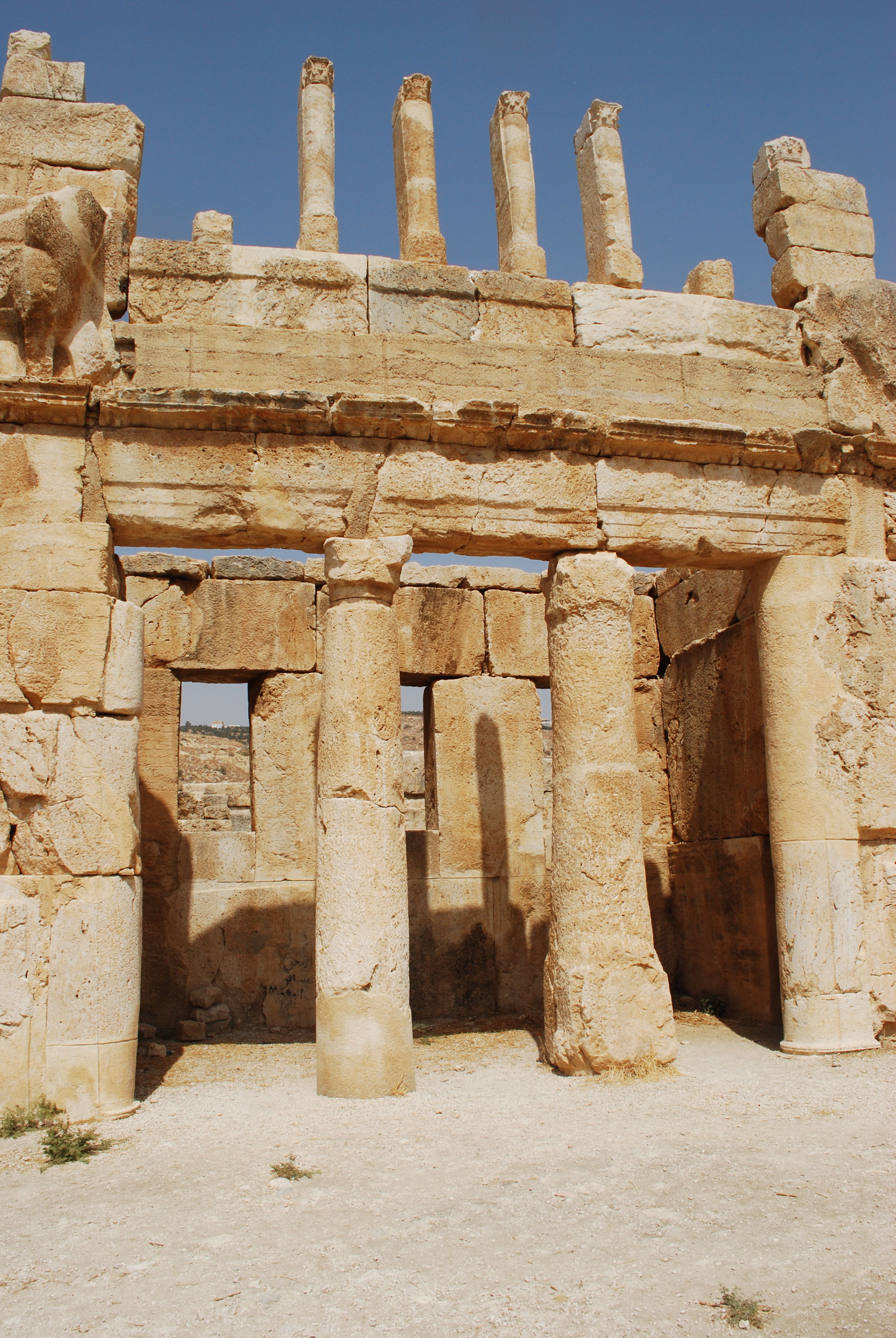 Le château d'Iraq al Amir : façade sud.